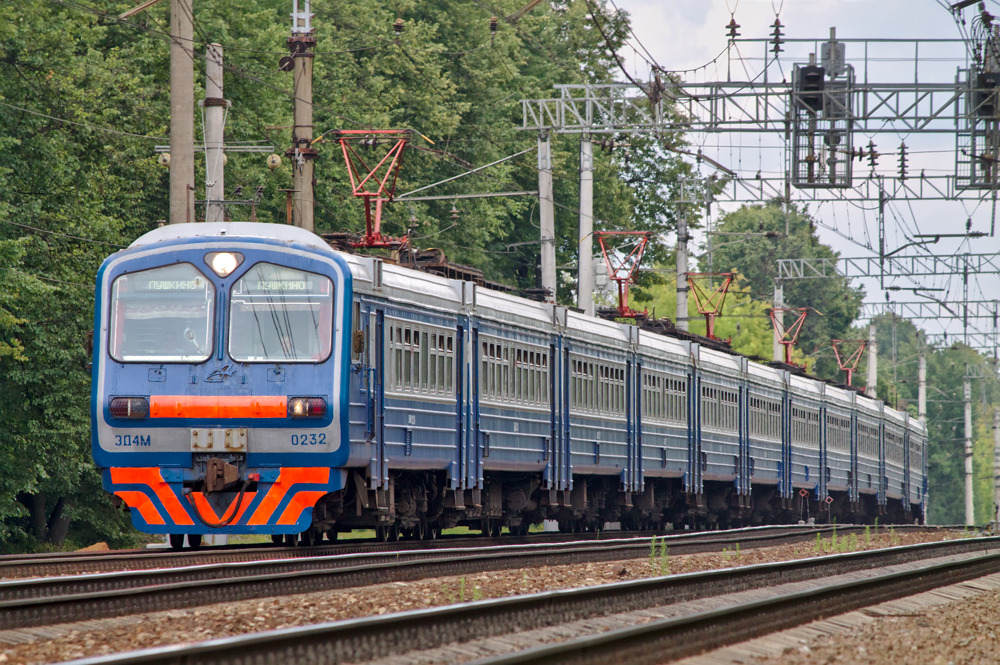 ЭД4М-0232, Мытищи см. фото 607931 в альбоме автора